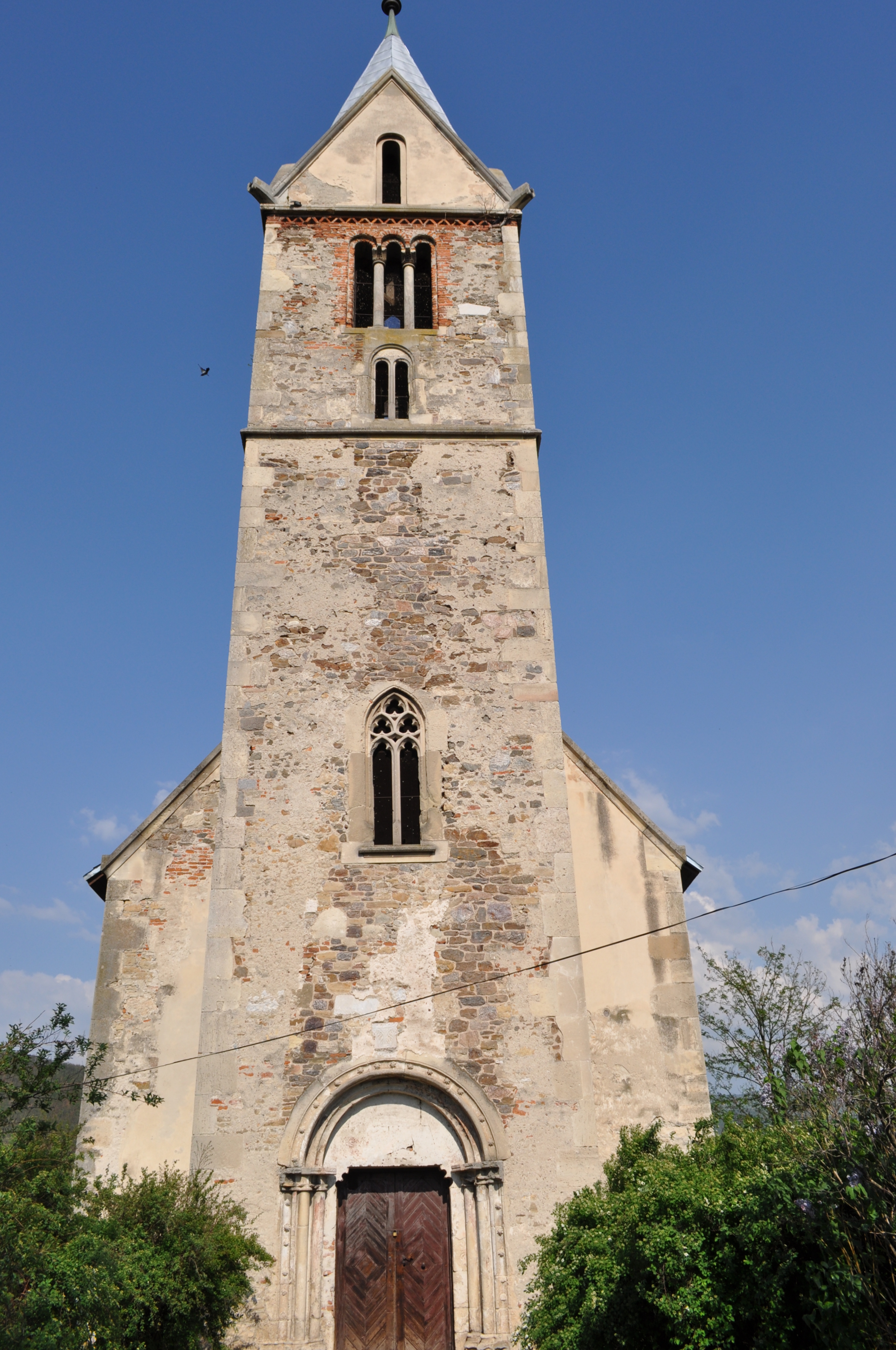 Biserica cnezilor Cândea, azi Biserica reformată